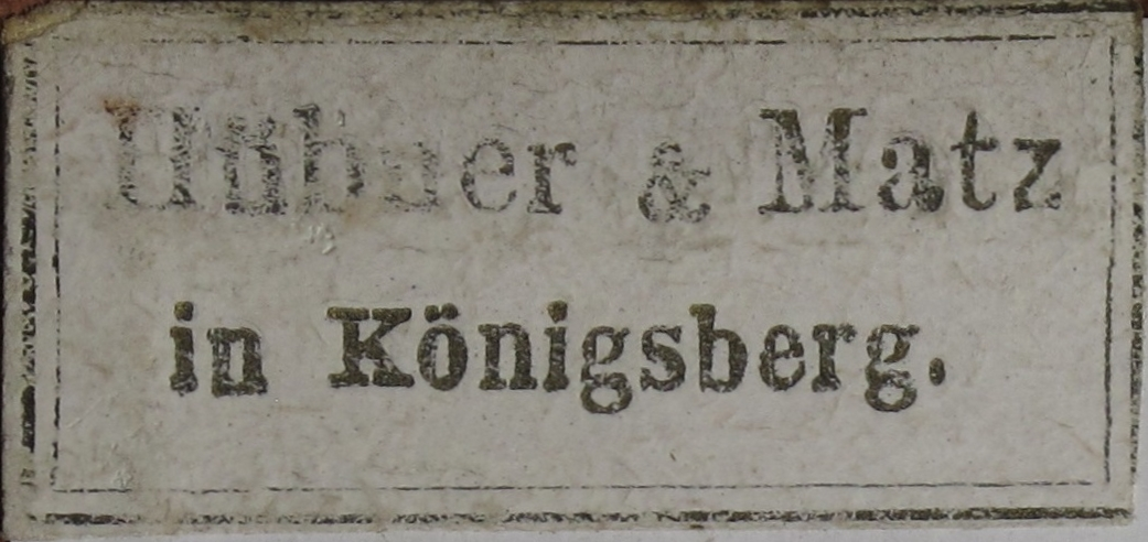 Hübner und Matz Buchhändlerschildchen auf dem Vorsatz des Bandes, Exemplar der Staatsbibliothek zu Berlin – Preußischer Kulturbesitz (Signatur 19 ZZ 3573